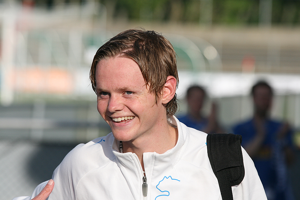 Ørjan Røyrane